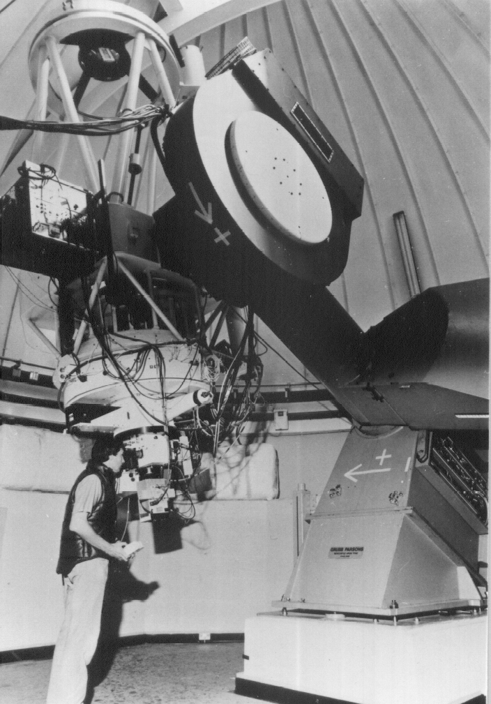 De 1 meter Jacobus Kapteyn Telescoop, behorend tot de Isaac Newton Group op het Observatorio del Roque de los Muchachos. De telescoop is genoemd naar de Nederlandse astronoom Jacobus Cornelius Kapteyn (1851-1922). Kapteyn was de grondlegger van het onderzoek van de ruimtelijke verdeling en beweging van sterren in onze Melkweg en oprichter van het sterrenkundig Kapteyn Laboratorium aan de Rijksuniversiteit te Groningen. Koningin Beatrix zal deze telescoop op 29 juni 1985 officieel openen. De telescoop is speciaal ontworpen voor astrometrisch werk. Dit is het nauwkeurig bepalen van sterposities en -bewegingen. Het ontwerp is zodanig dat gebieden aan de hemel met een doorsnee van 1,5 graad (driemaal de diameter van de volle Maan) kunnen worden gefotografeerd zonder beeldfouten. De individuele sterren kunnen worden afgebeeld met een diameter van minder dan 0,5 boogsekonde, mits de luchtonrust tenminste niet voor grotere beeldfouten zorgt. De telescoop kan eveneens worden gebruikt voor het optisch identificeren van interessante radio- en röntgenbronnen. Waarnemingen over een langere periode kunnen worden gebruikt om de relatieve verplaatsingen van sterren te bestuderen. Deze informatie geeft inzicht in de relatieve beweging van sterren in de omgeving van onze Zon en in de rotatie van de Melkweg. De bewegingen worden gemeten ten opzichte van ver verwijderde sterrenstelsels en quasars.